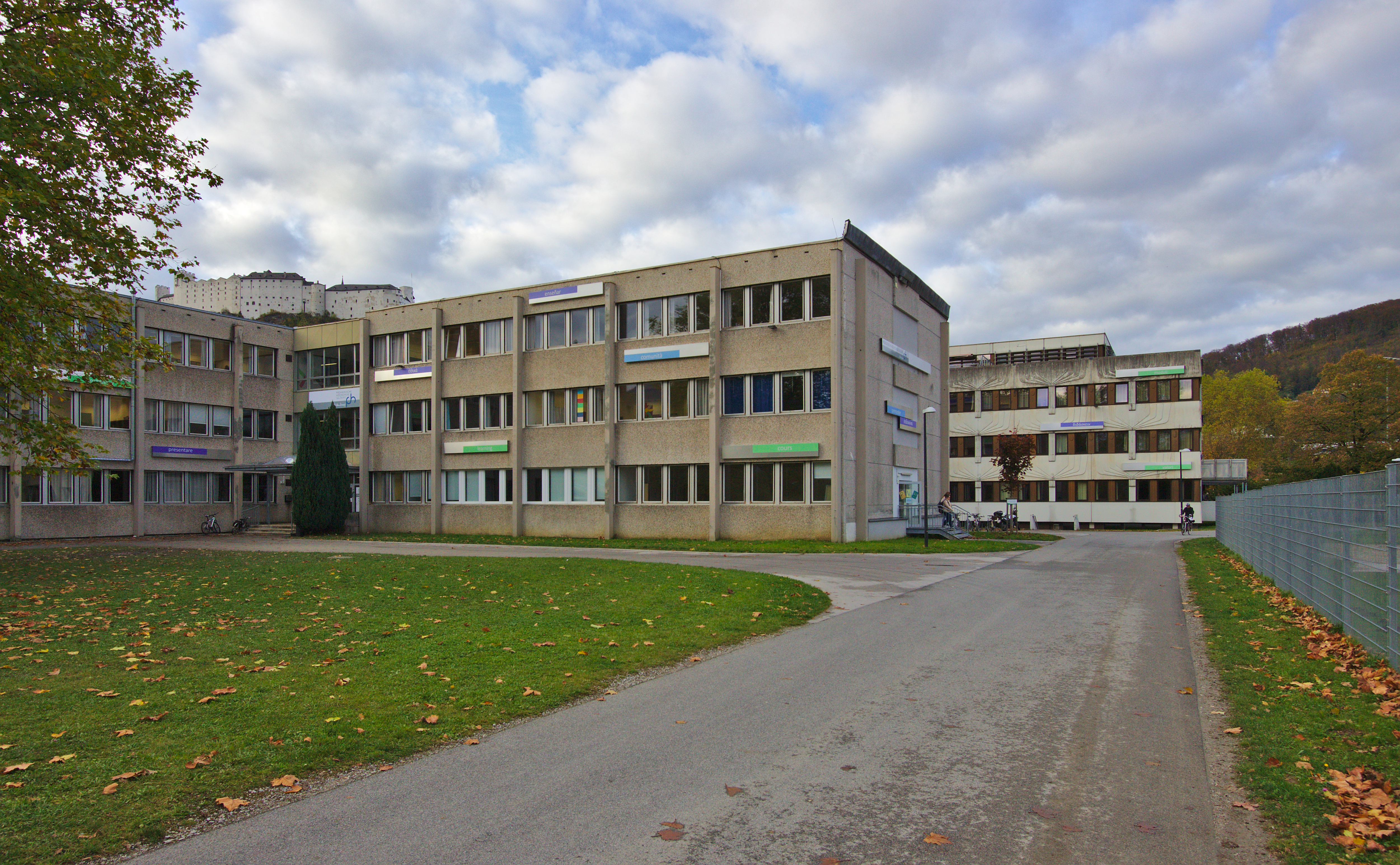 Pädagogische Hochschule Salzburg Akademiestraße 27